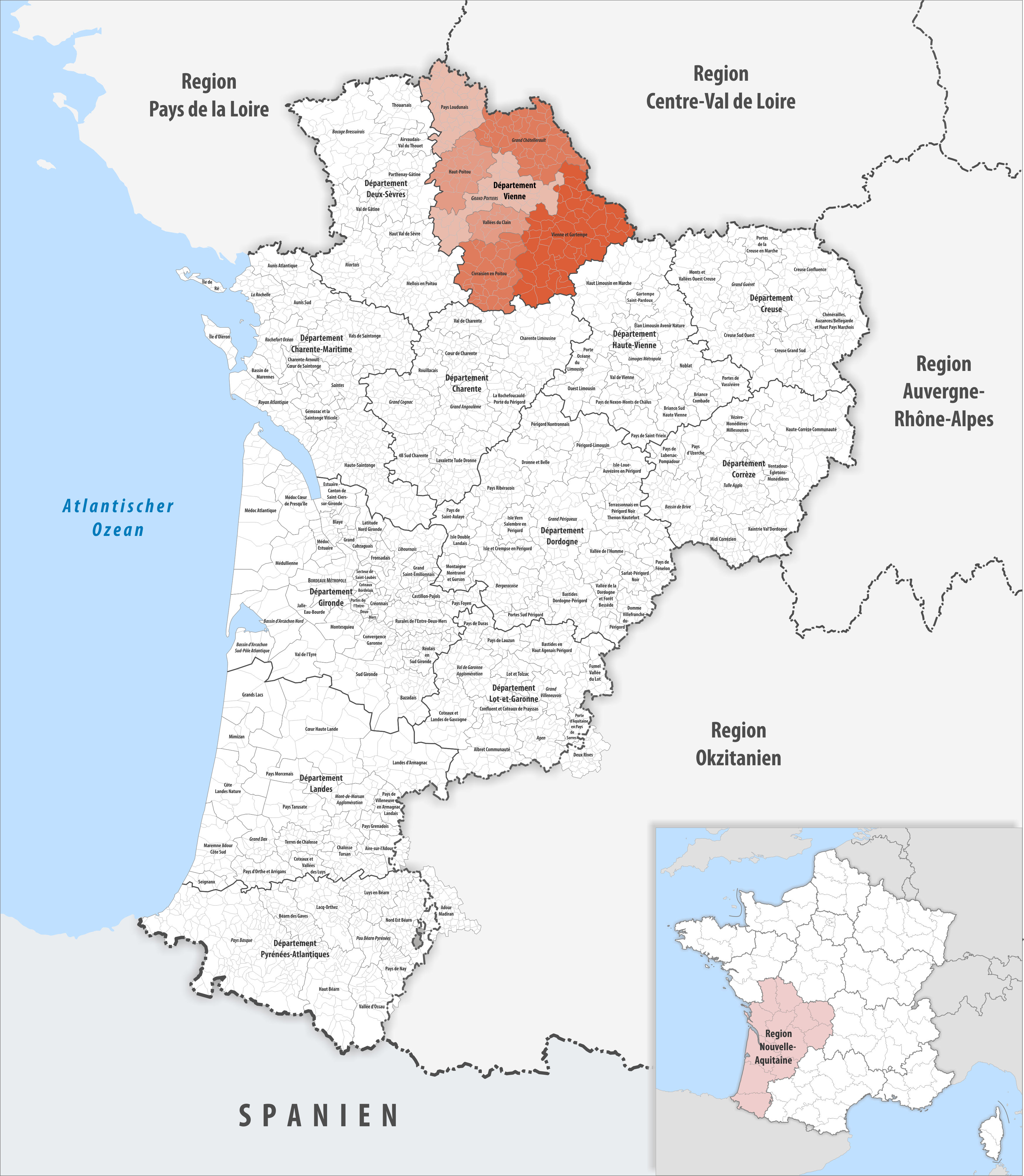 Gemeindeverbände im Département Vienne